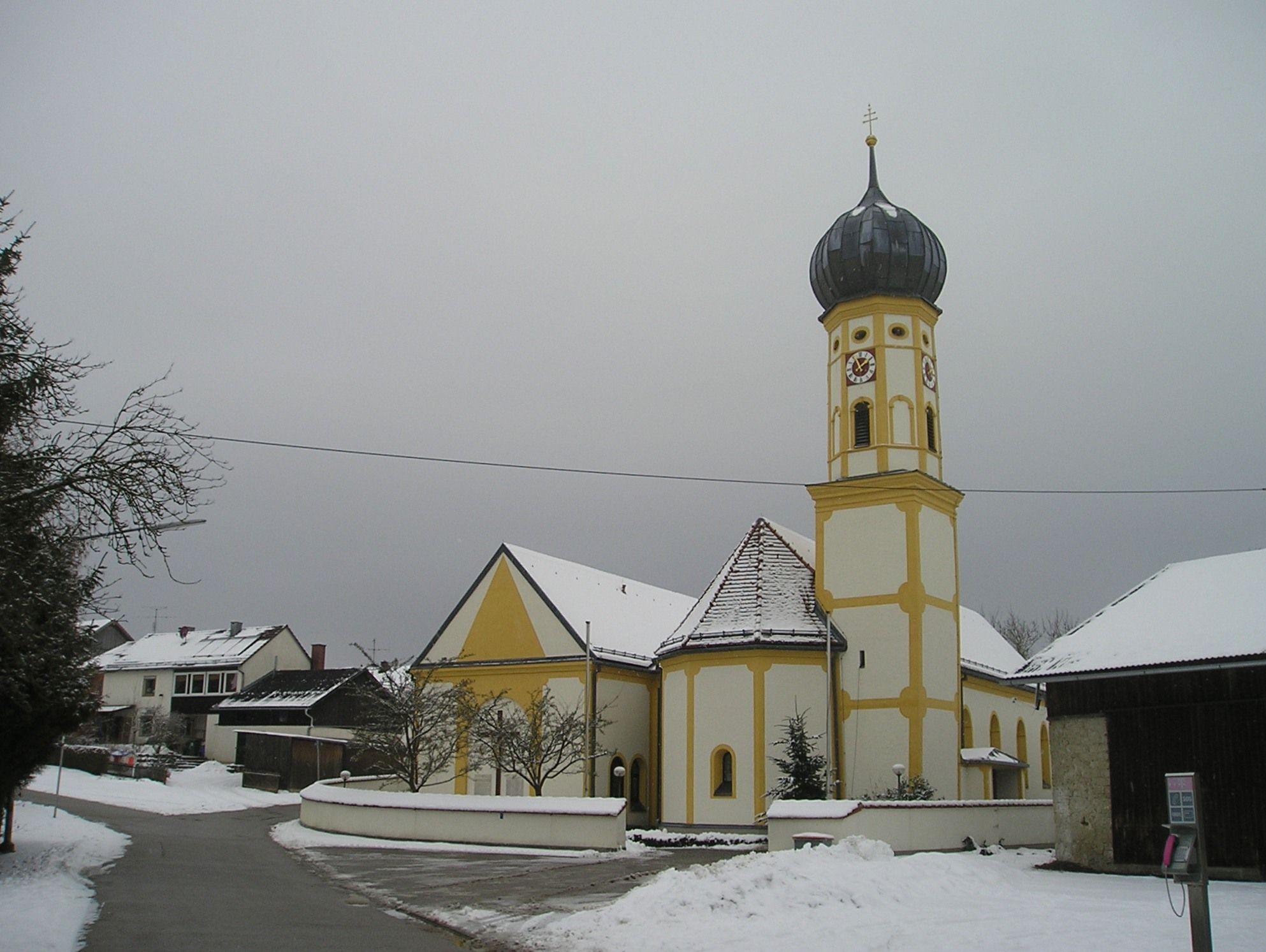 Steinsdorf, Ortsteil von Altmannstein im oberbayerischen Landkreis Eichstätt